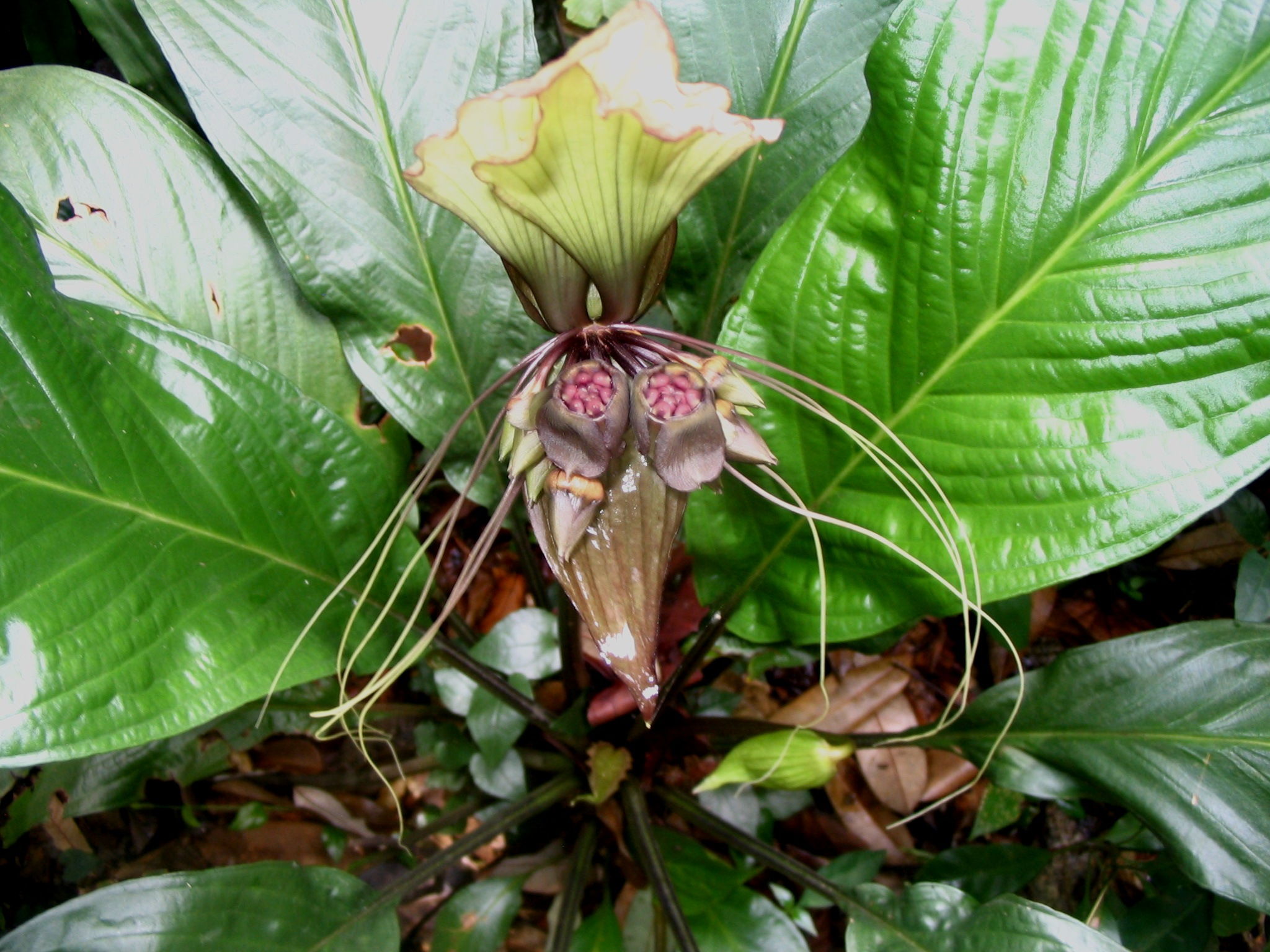 Tacca integrifolia - Détail de la fleur . Bukit Nanas Forest Reserve, Kuala Lumpur - Malaisie